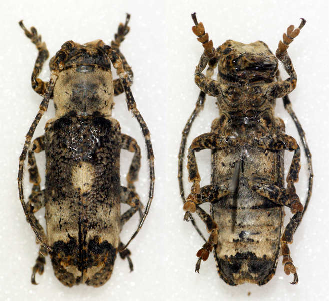 Fabricius,1801 Sex: Female Data: 16-09-13 - Kloto - Togo Size: ?